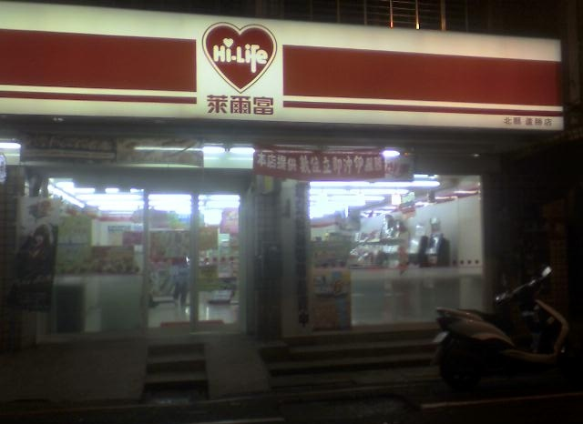 萊爾富北縣蘆勝店，位於臺北縣蘆洲市永樂街38巷40號1樓，2012年歇業。